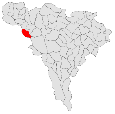 Categorie:Hărţi ale judeţului Alba